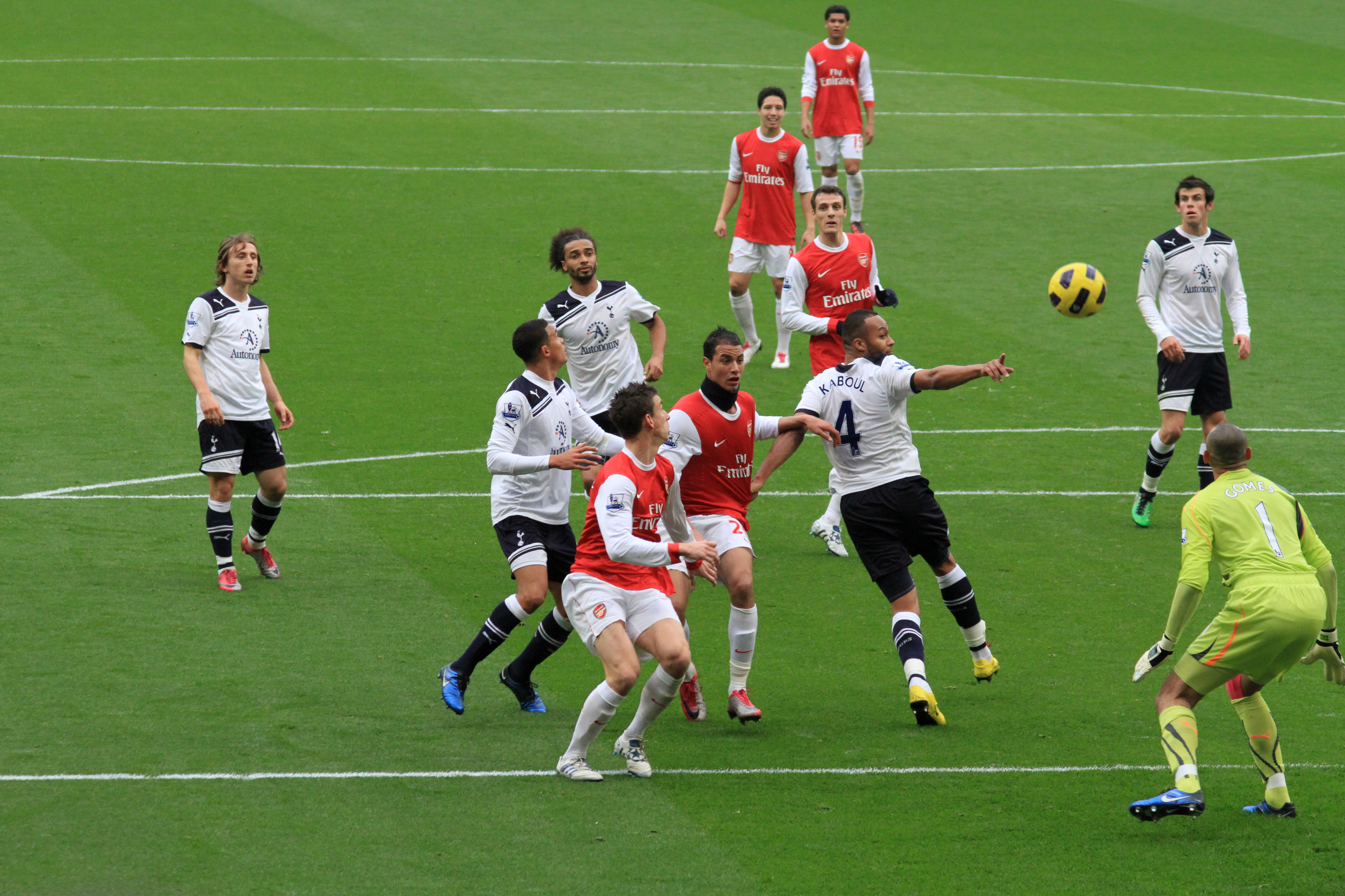 Arsenal attack! 4